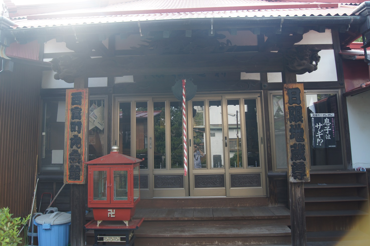 日限地蔵 (藤沢市)本堂